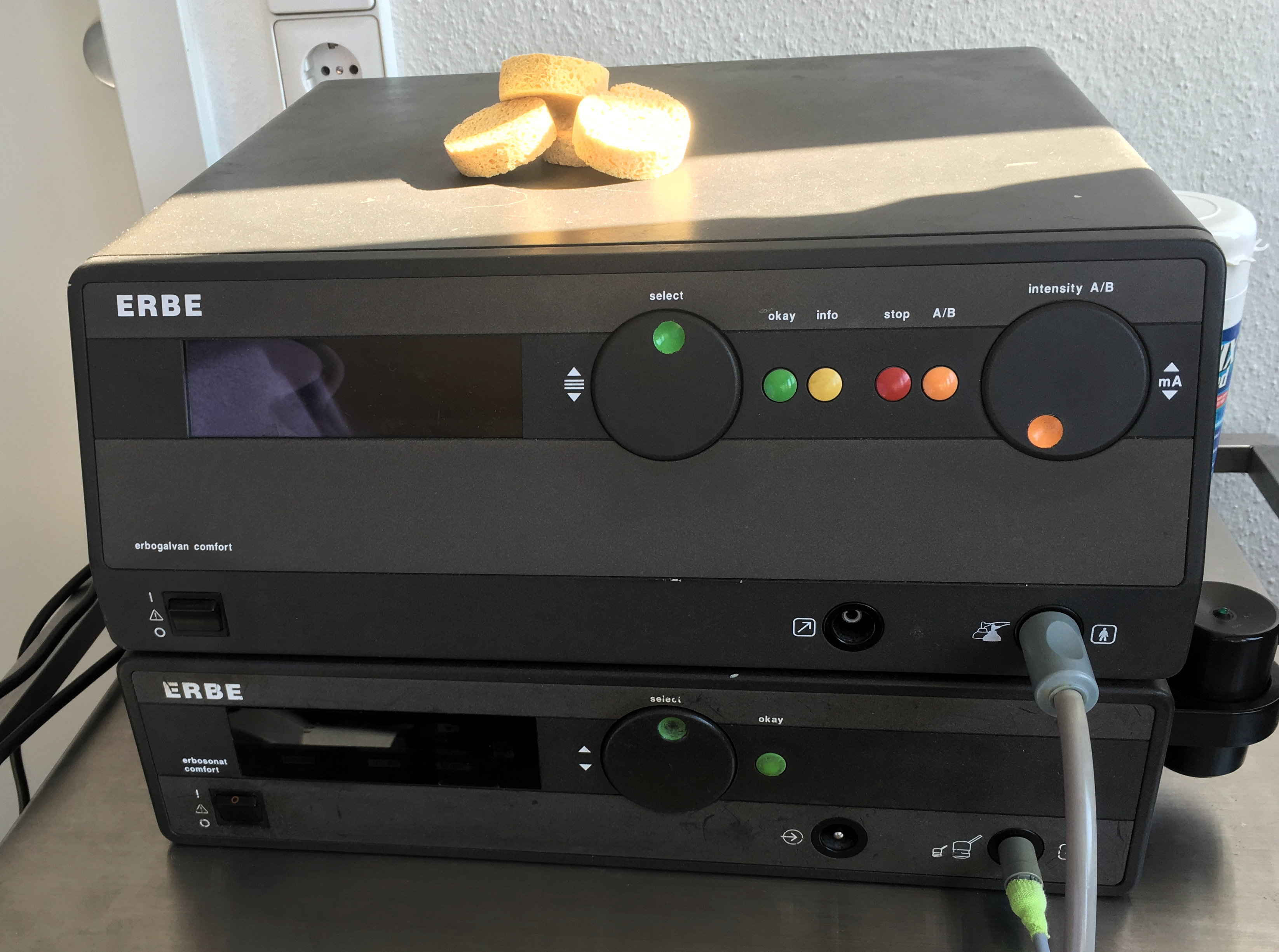 Medizinische Geräte der Firma ERBE Elektromedizin GmbH: Erbogalvan Comfort (oben) und Erbosonat Comfort (unten)